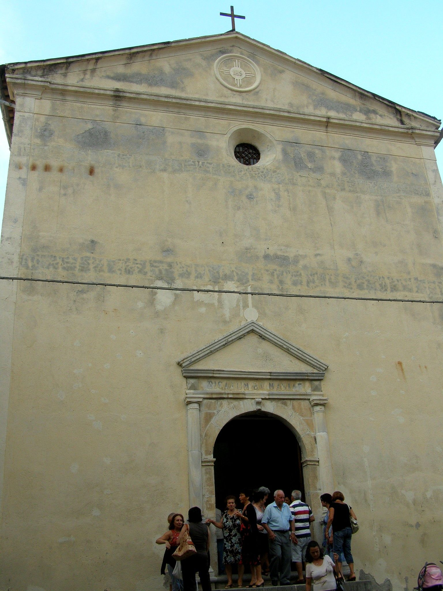 Priečelie kostola Santa Maria d'Episcopio v starom meste